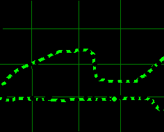 sam som to len tak v malovani vytvoril, skarede jak noc ;-) Licensing